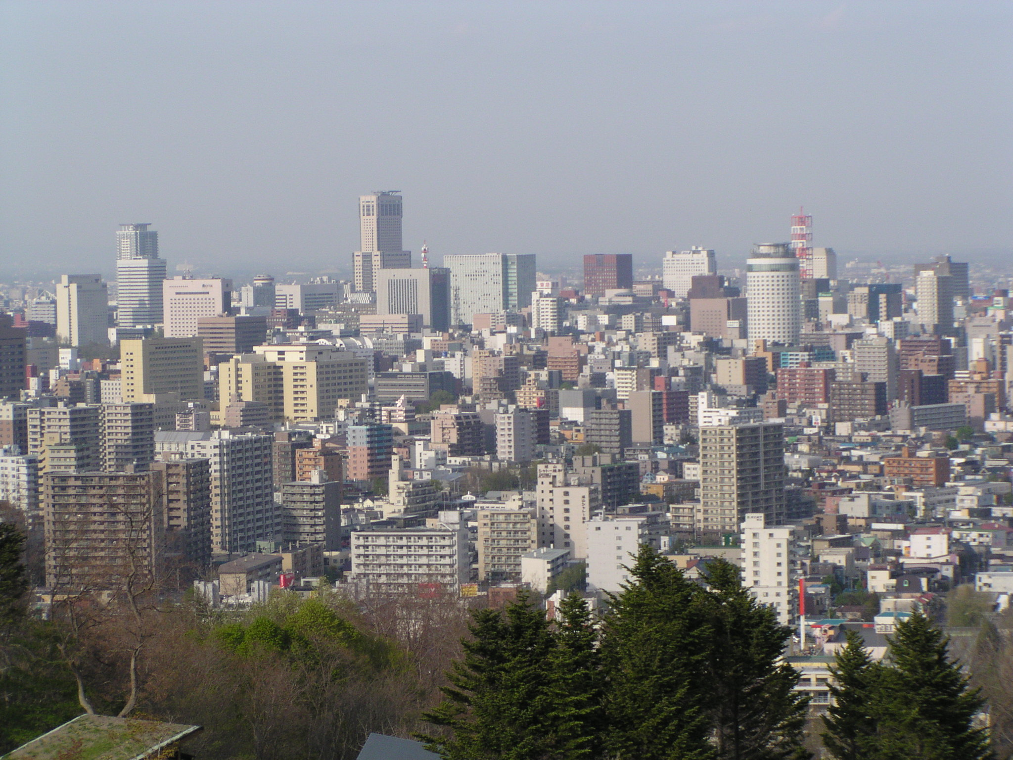 4 Chome Sakaigawa, Chūō-ku, Sapporo-shi, Hokkaidō 064-0943, Japan